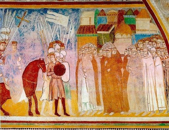 Affresco dipinto nella Sala di Giustizia della Rocca Borromea di Angera raffigurante la vittoriosa entrata in Milano dell'arcivescovo Ottone Visconti.